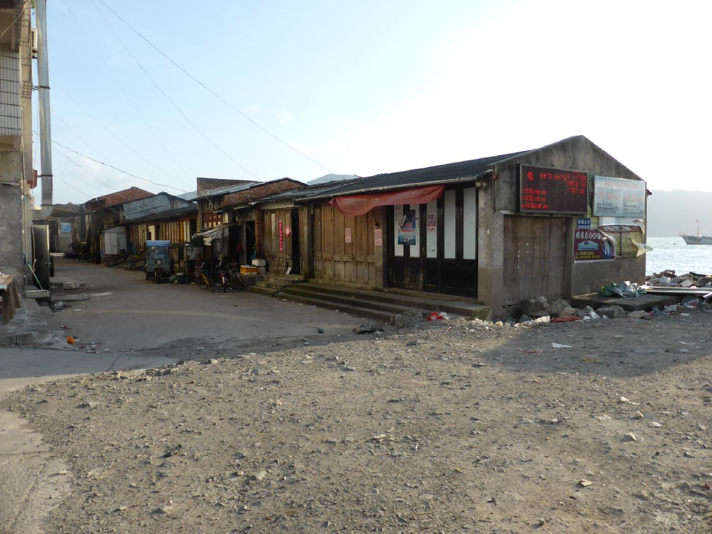 福鼎市沙程港から台山島への船がある